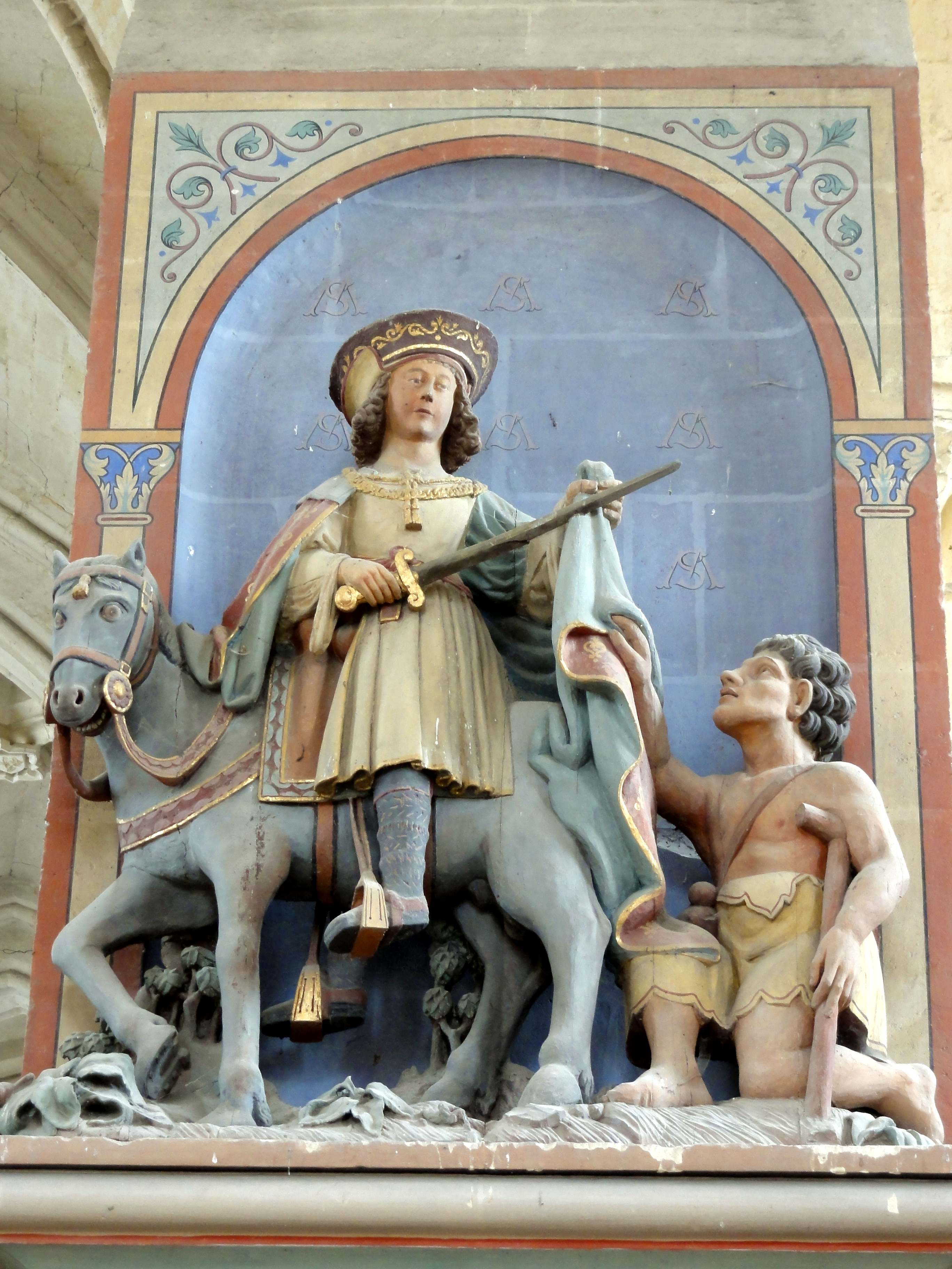 Mobilier de l'église - voir titre.